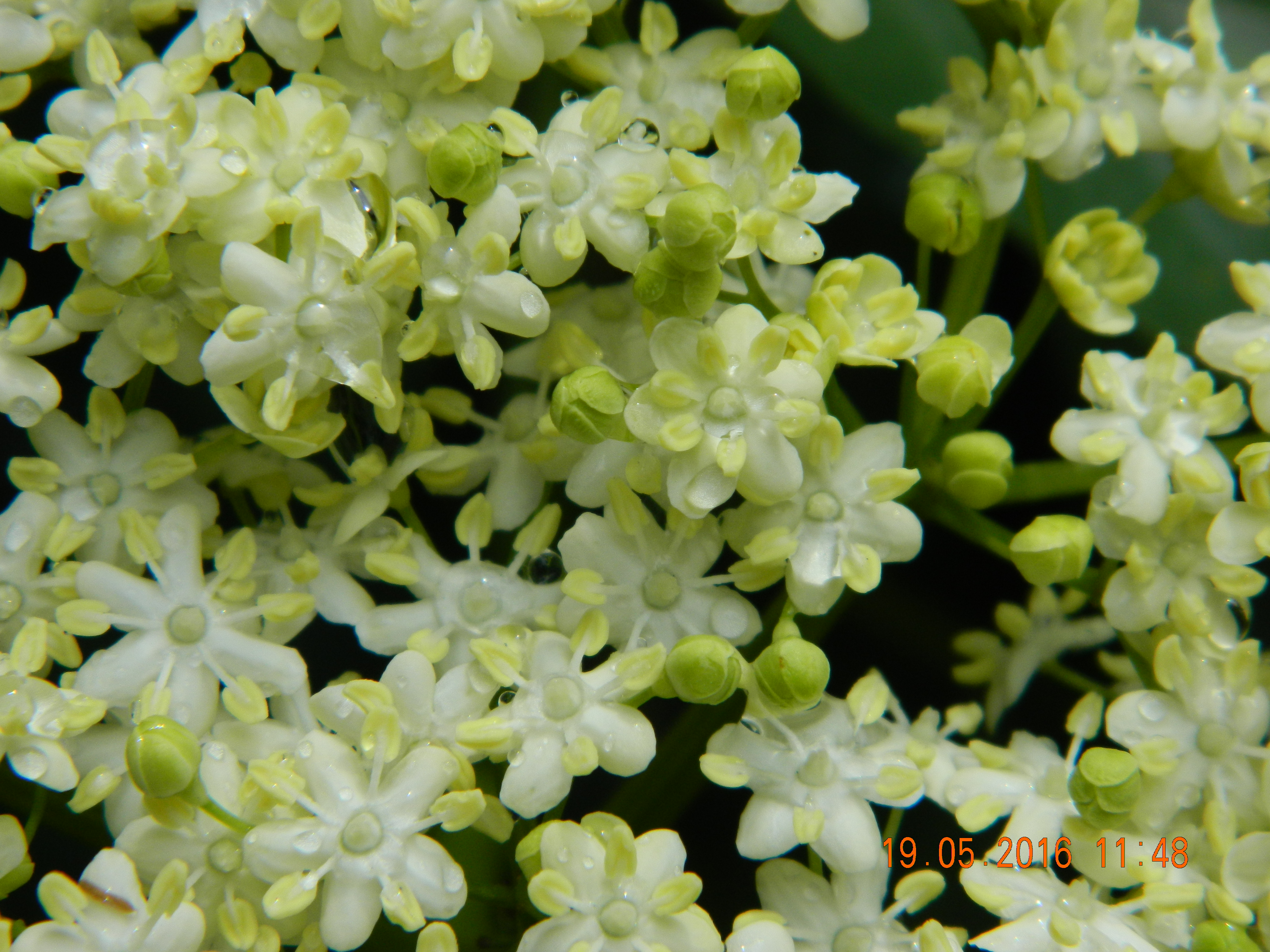 Бузина. Квіти. Київ, 19.05.2016.英语：Sambucus. Flowers. Kyiv, 05.19.2016